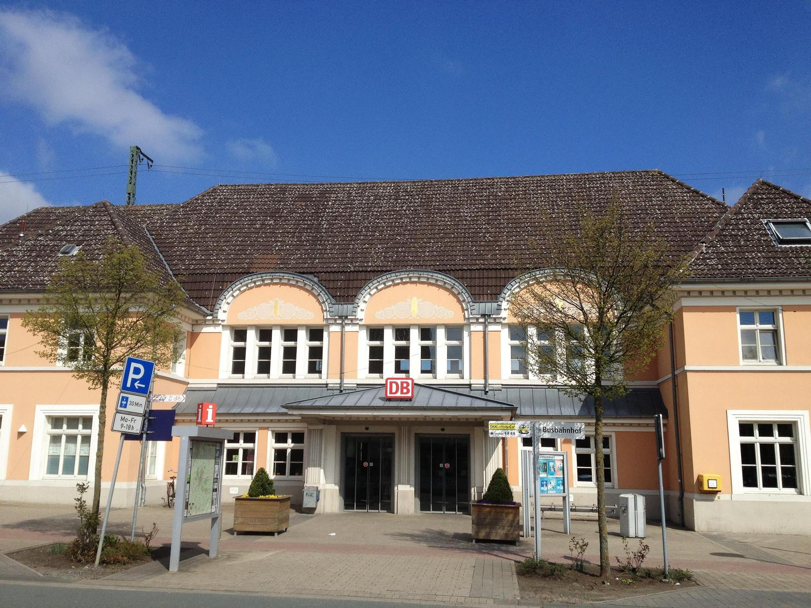 Oelder Bahnhof - Frontalansicht